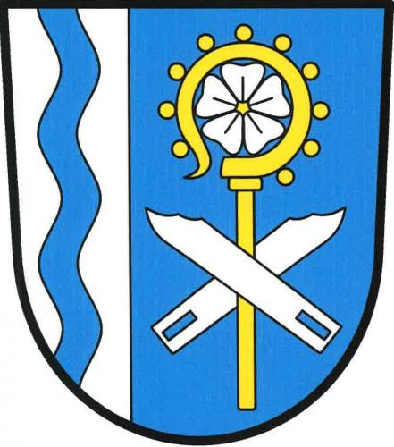 Čistá u Horek znak